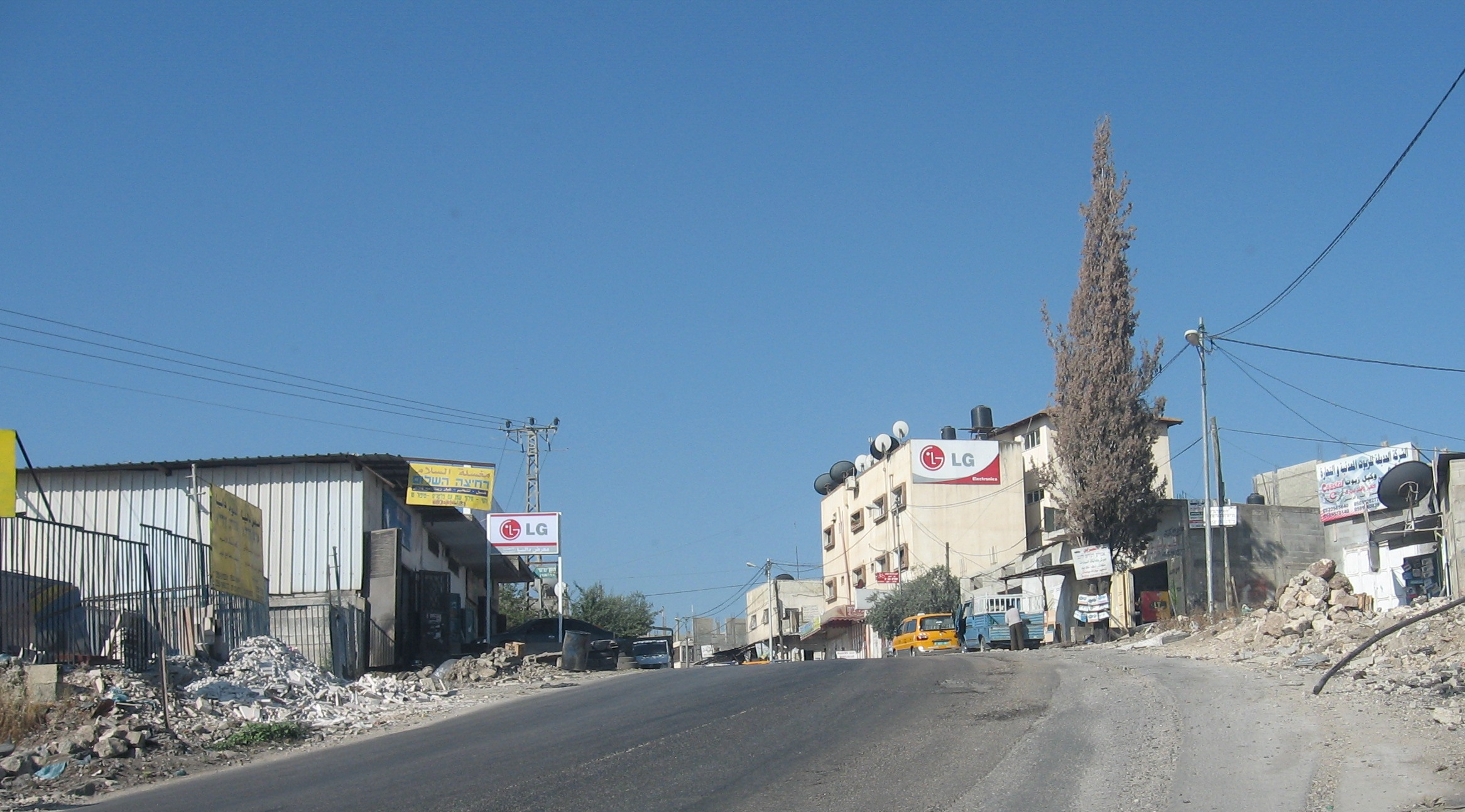 אל-פונדק